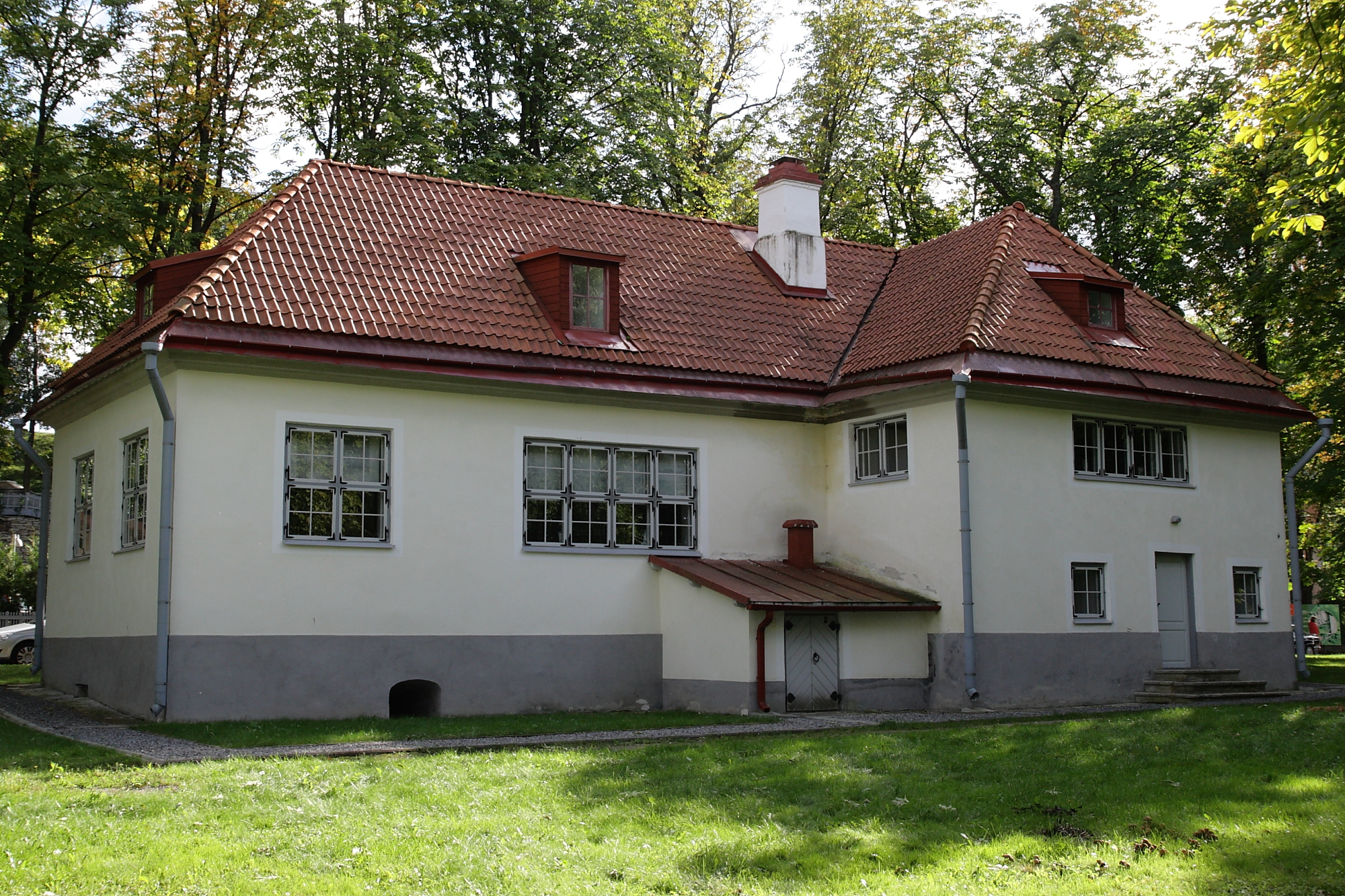 Tallinna Peeter I maja